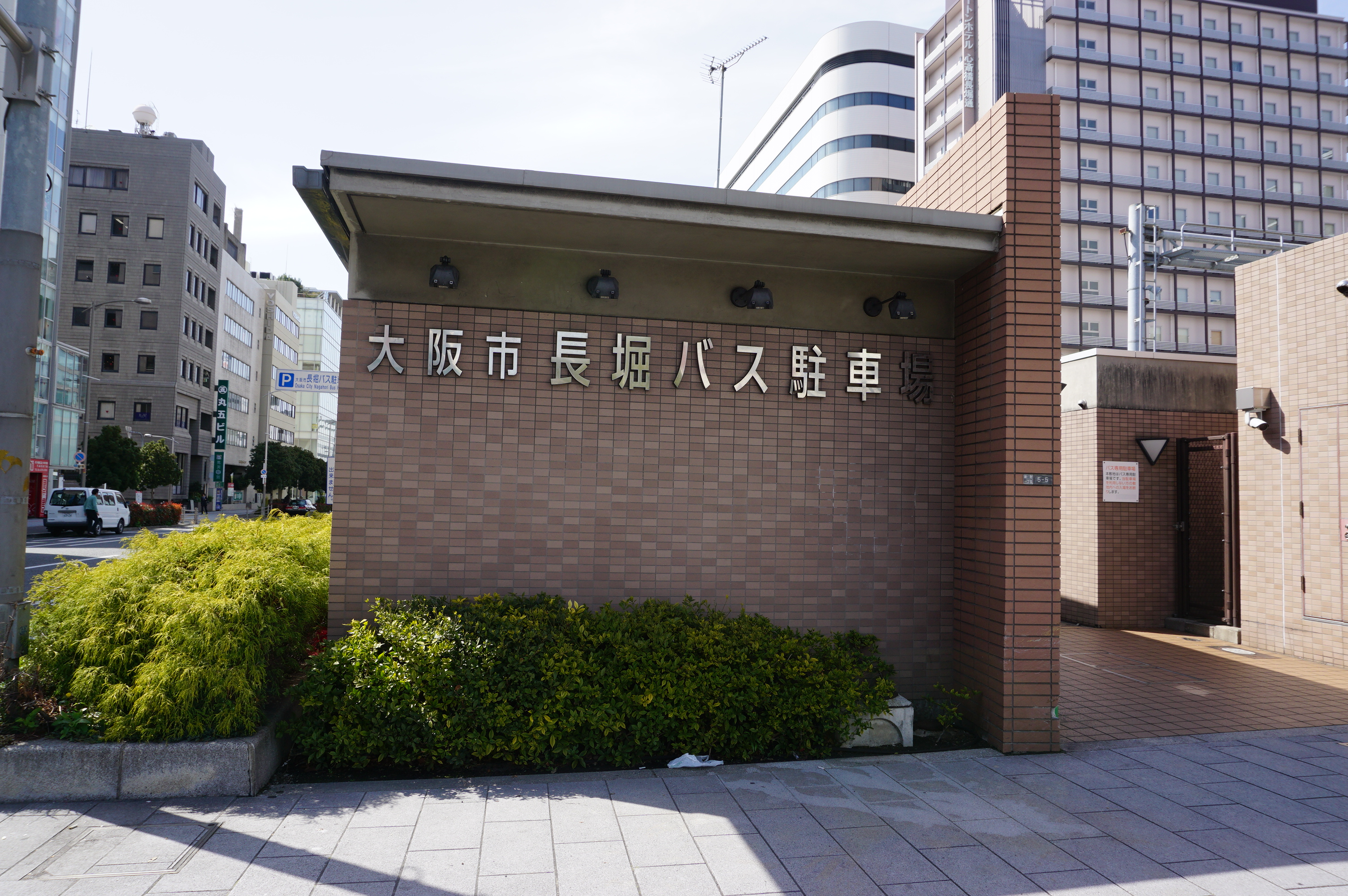 長堀通上にある入口